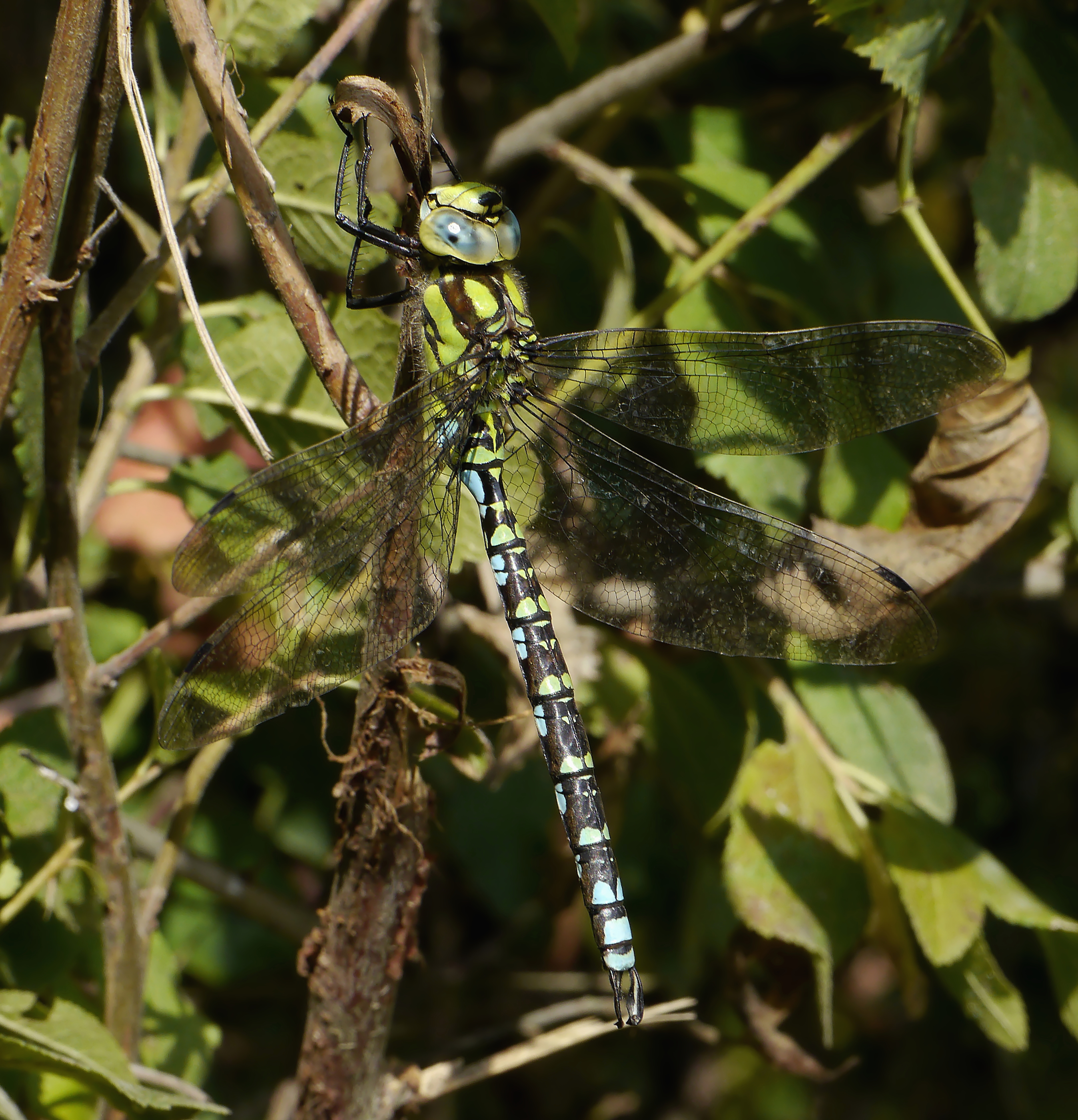 Blaugrüne Mosaikjungfer, Männchen - Aeshna cyanea. Aufgenommen in Kreith (Schwandorf), Bayern, Deutschland.